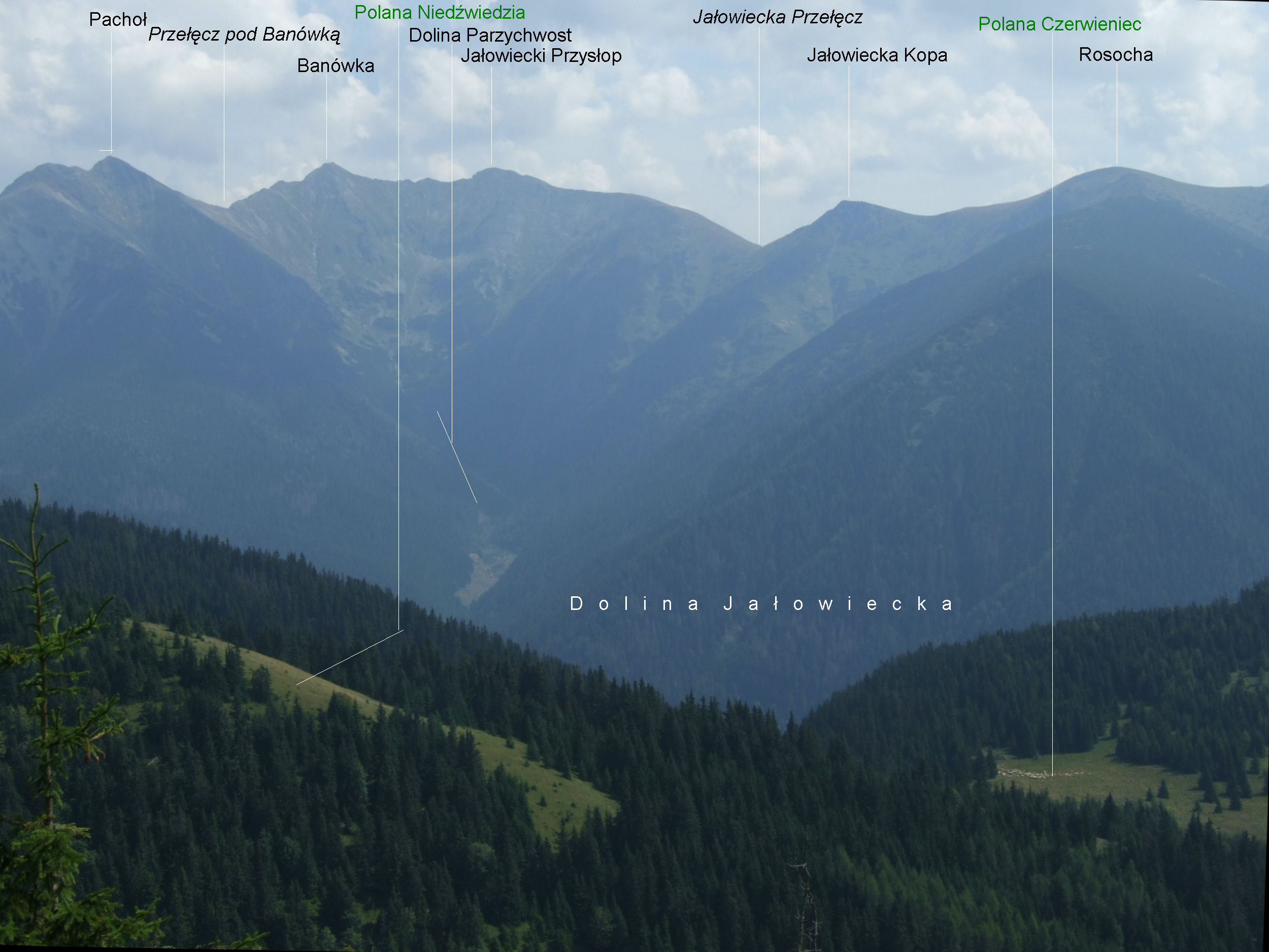 Wodok z Babkowej Przehyby